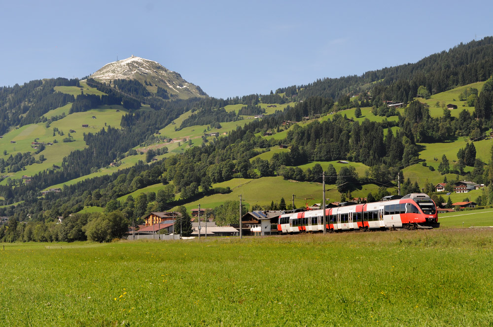 Ein Triebwagen der Baureihe 4024, zwischen Brixen im Thale und Kirchberg in Tirol.